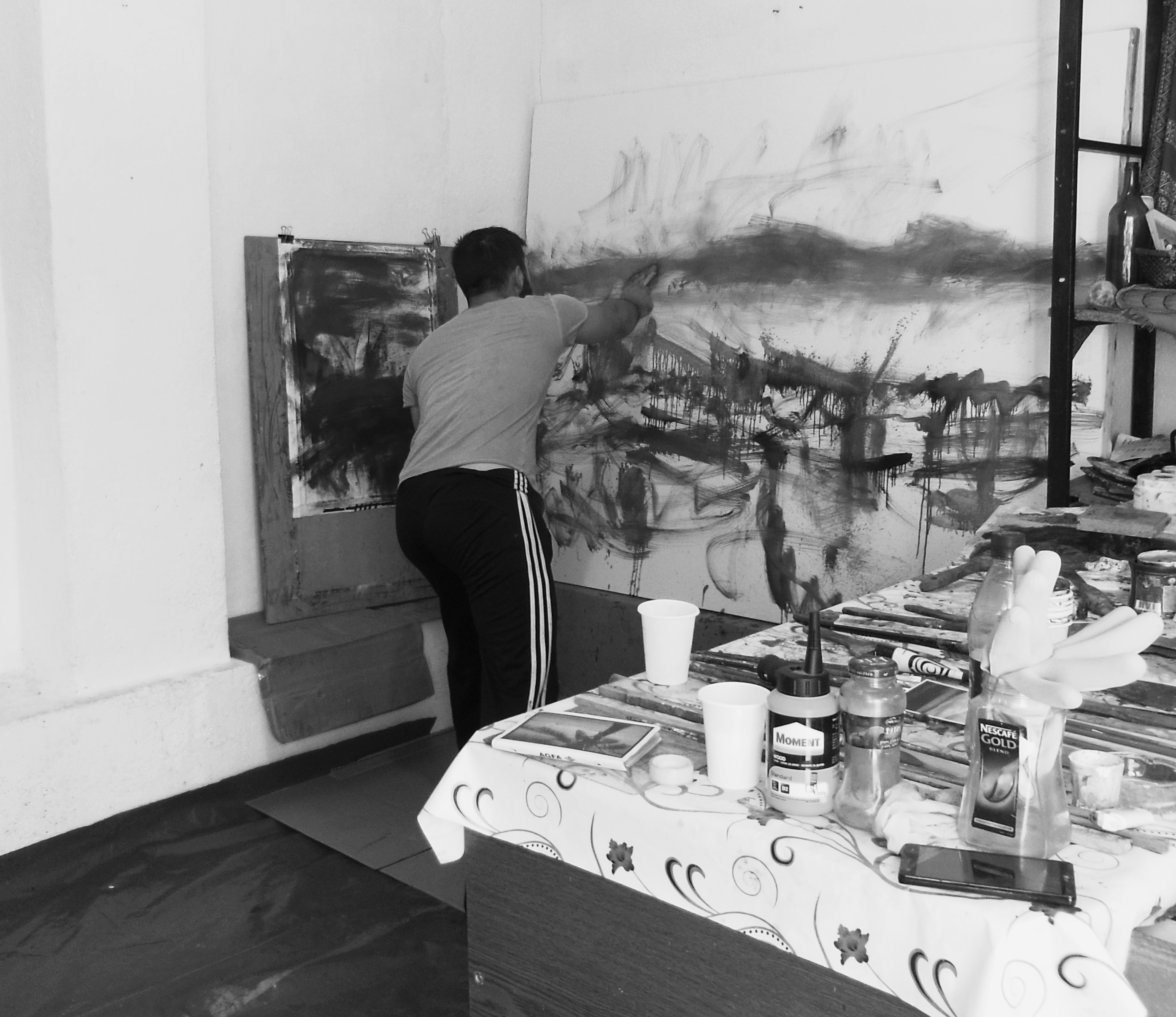 slika